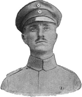 Kaarlo Ståhlberg